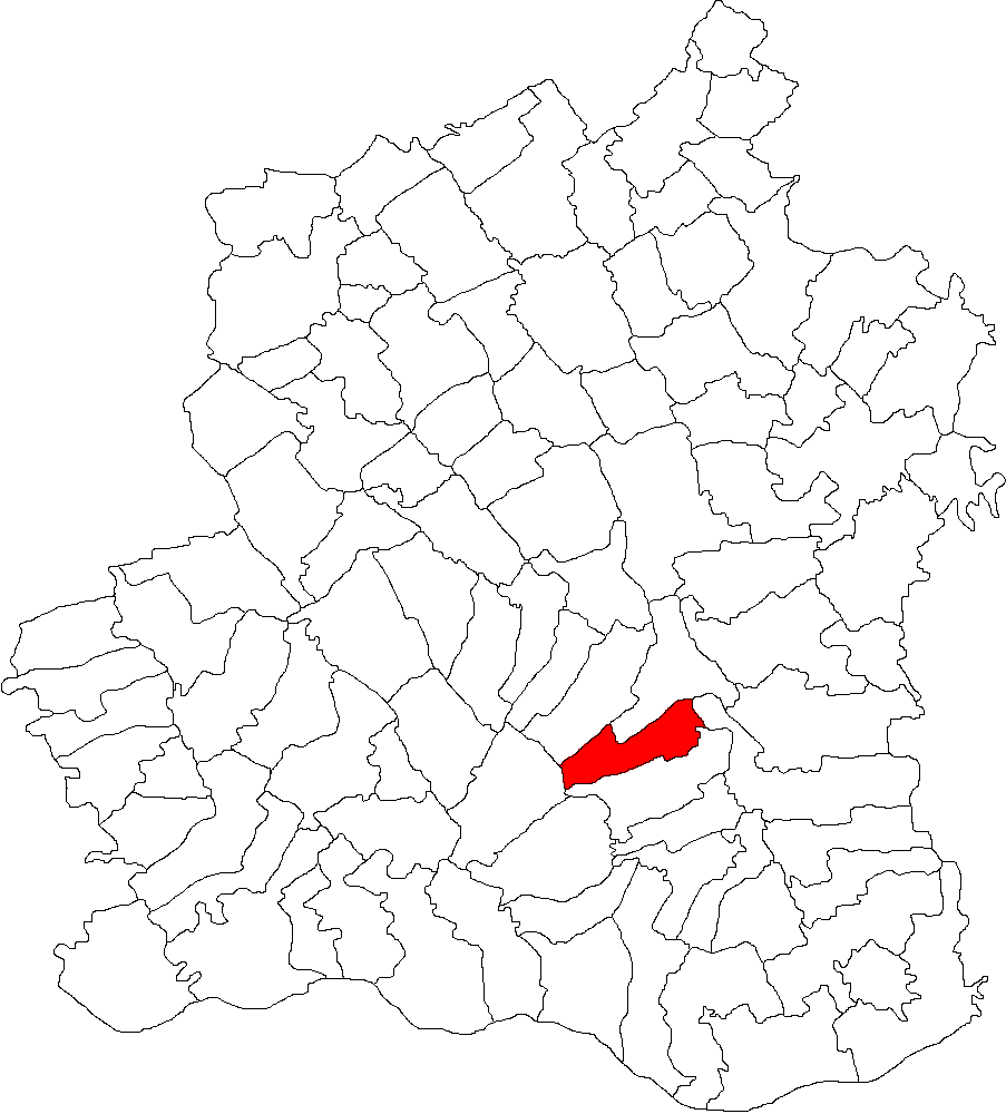 Categorie:Hărţi ale judeţului Teleorman